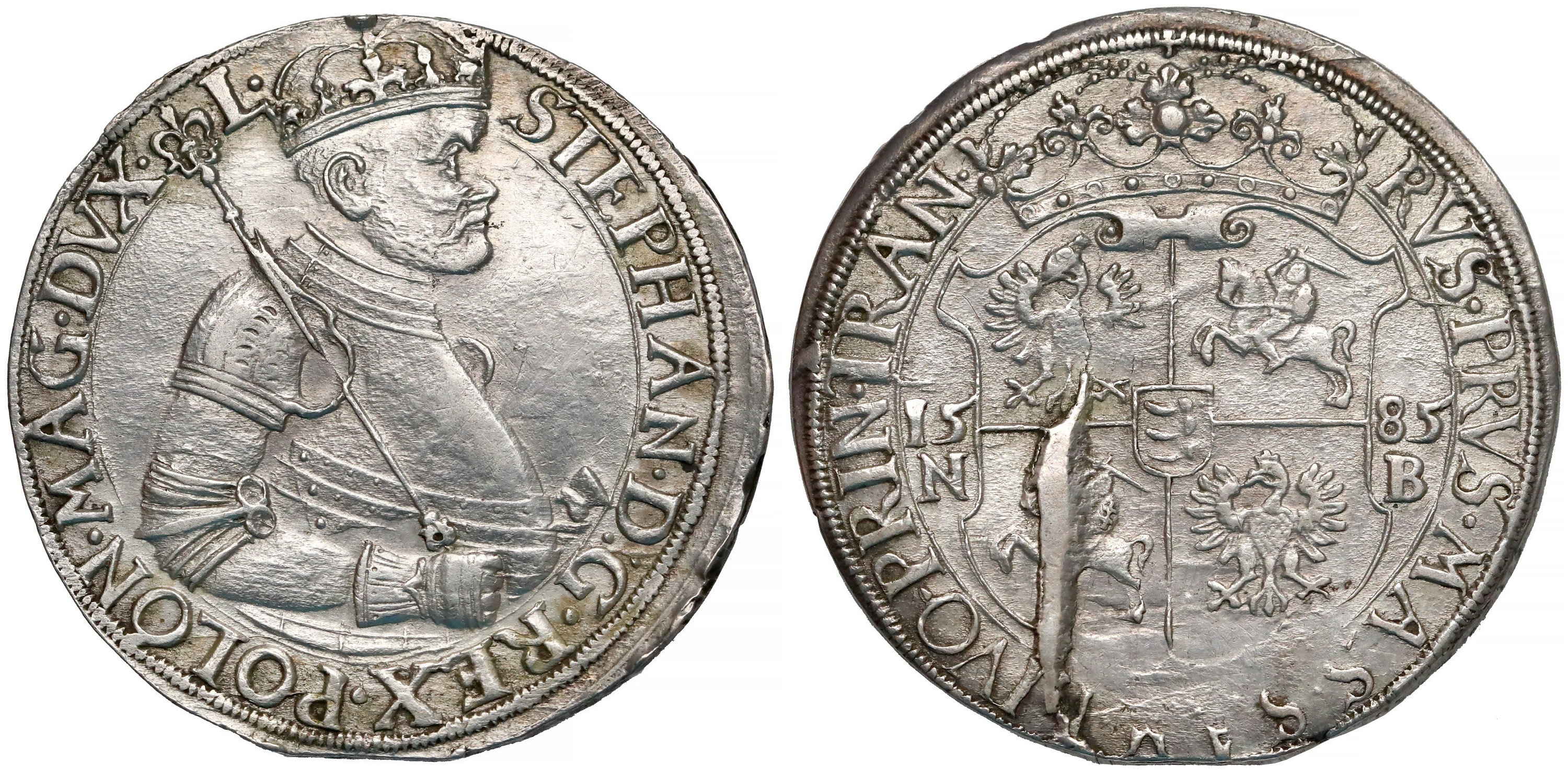 Talar 1585 Nagybanya